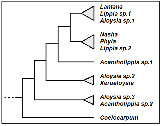 Cladogramma della tribù Lantaneae